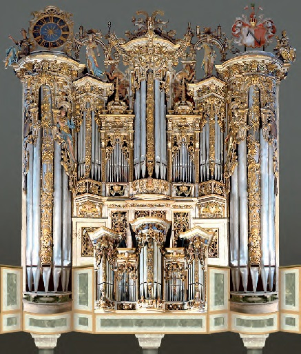 Gröninger Orgel der Martinikirche in Halberstadt, Sachsen-Anhalt, Deutschland